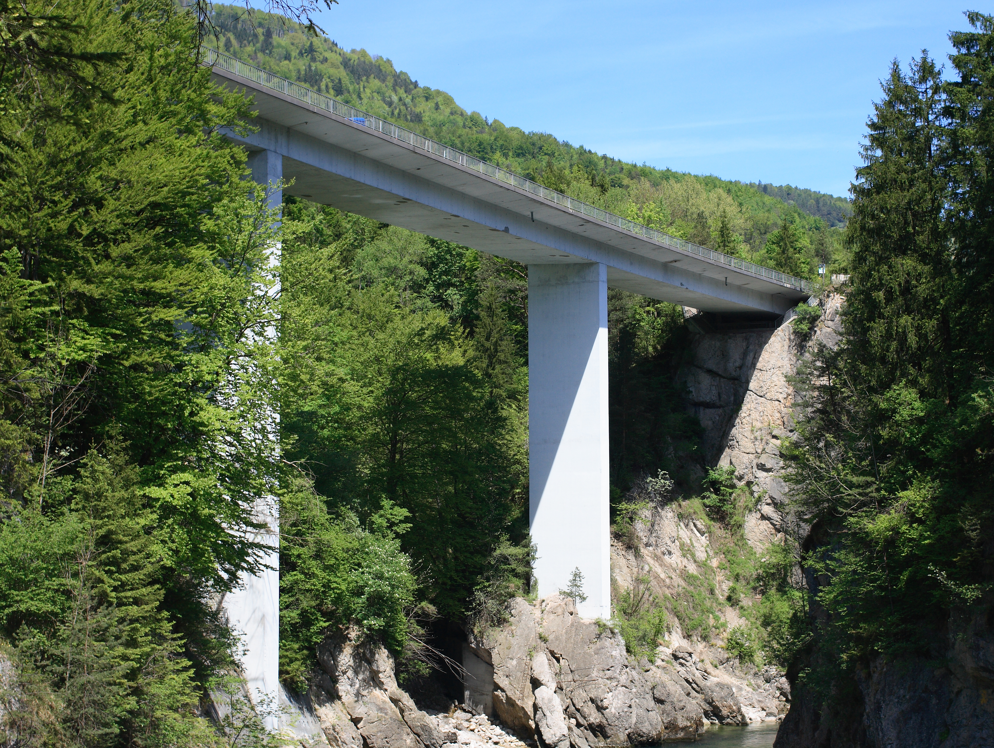 Der Talübergang Steyrdurchbruch (Steyrdurchbruch-Brücke) in Oberösterreich